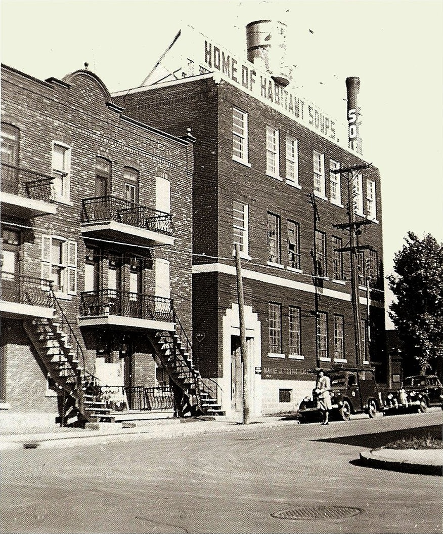 Usine des soupes Habitants à Montréal (rue Saint-Dominique entre Guizot et Liège) dans les années 1920. Premier propriétaire : Joseph-Philias Morin (1884-?)